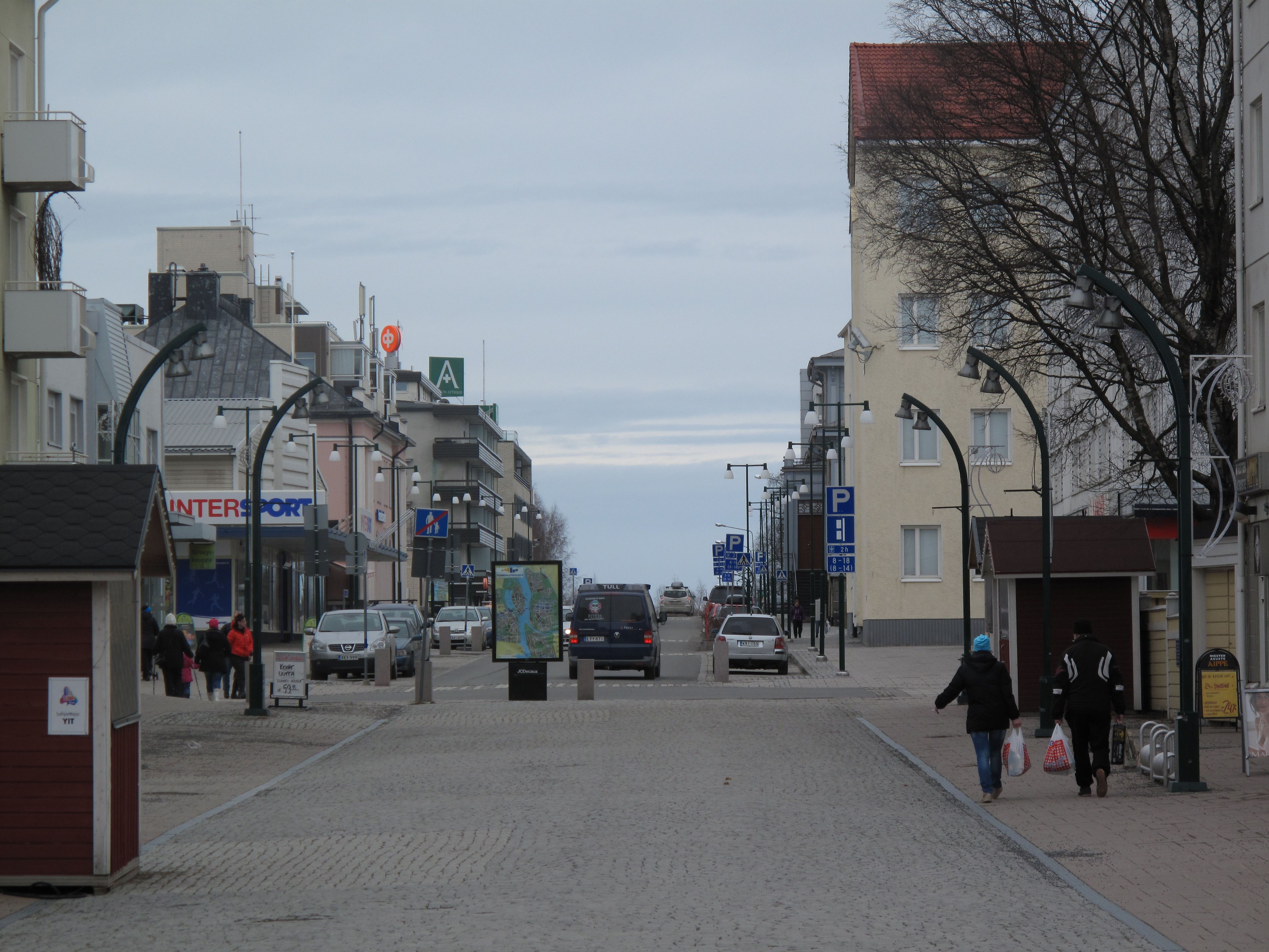 Huvudgata i Tornio centrum.